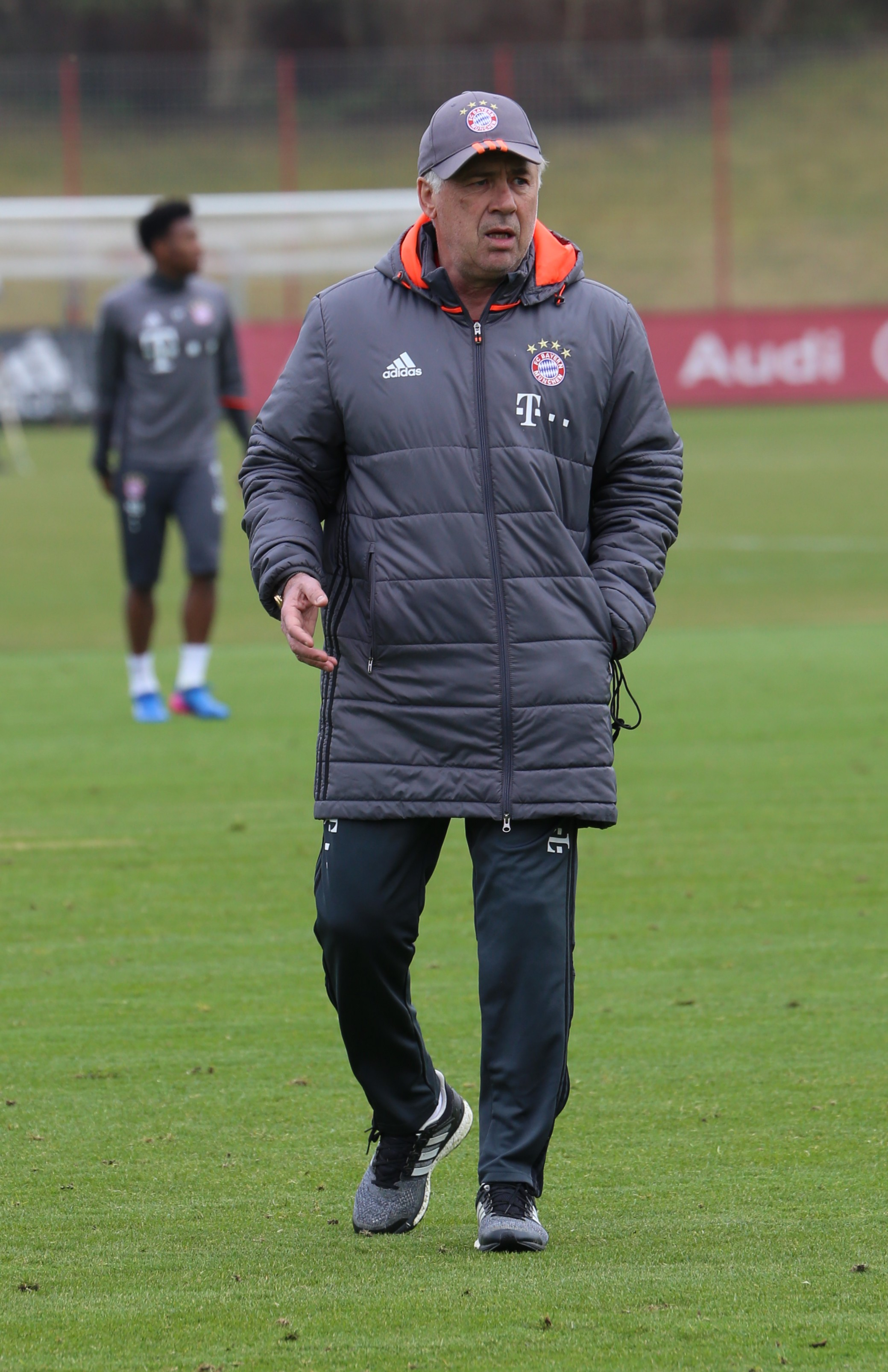 Carlo Ancelotti, Trainer, am 14. März 2017 beim Training auf dem Gelände des FC Bayern München